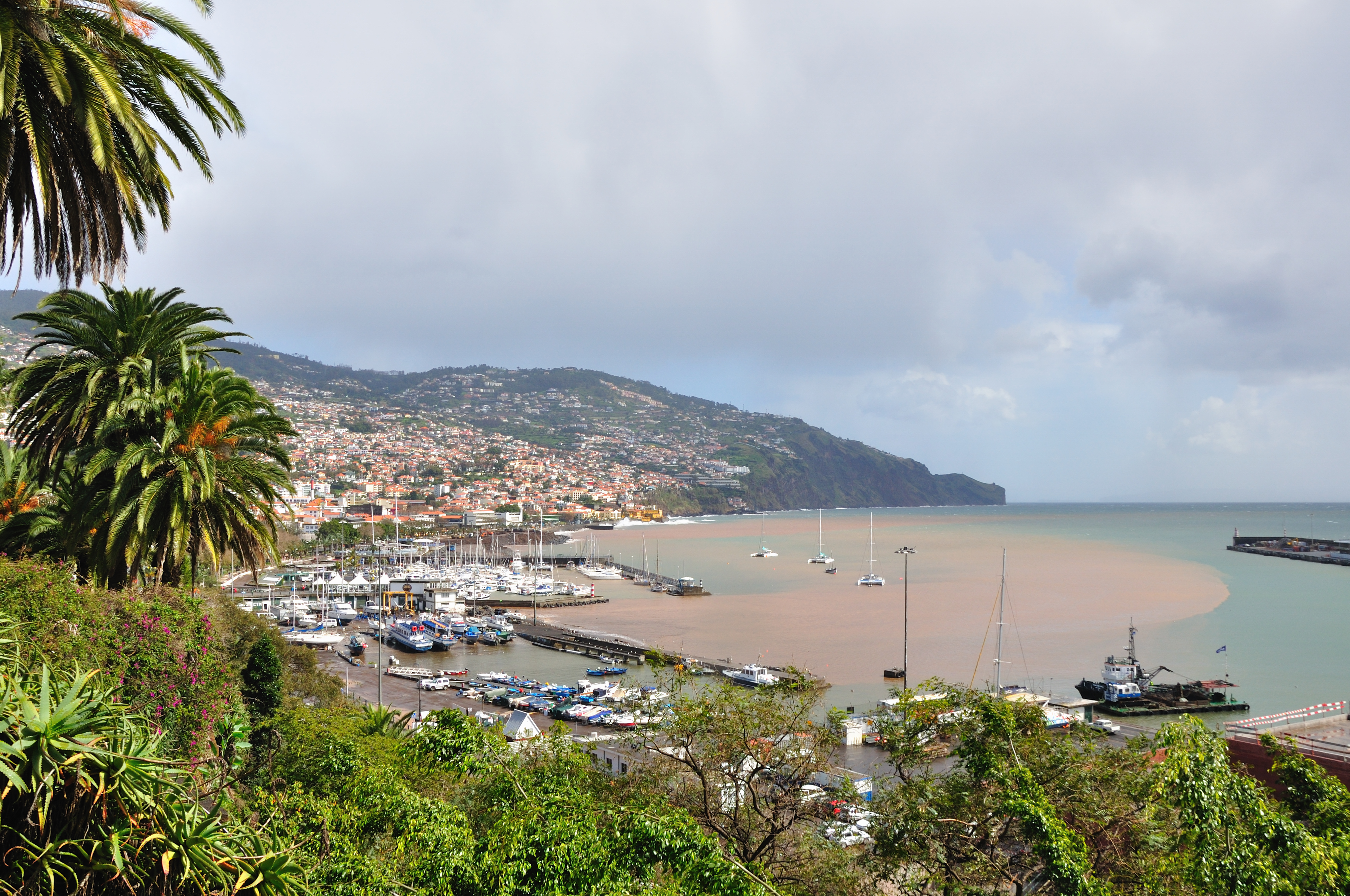 Portugal, Funchal